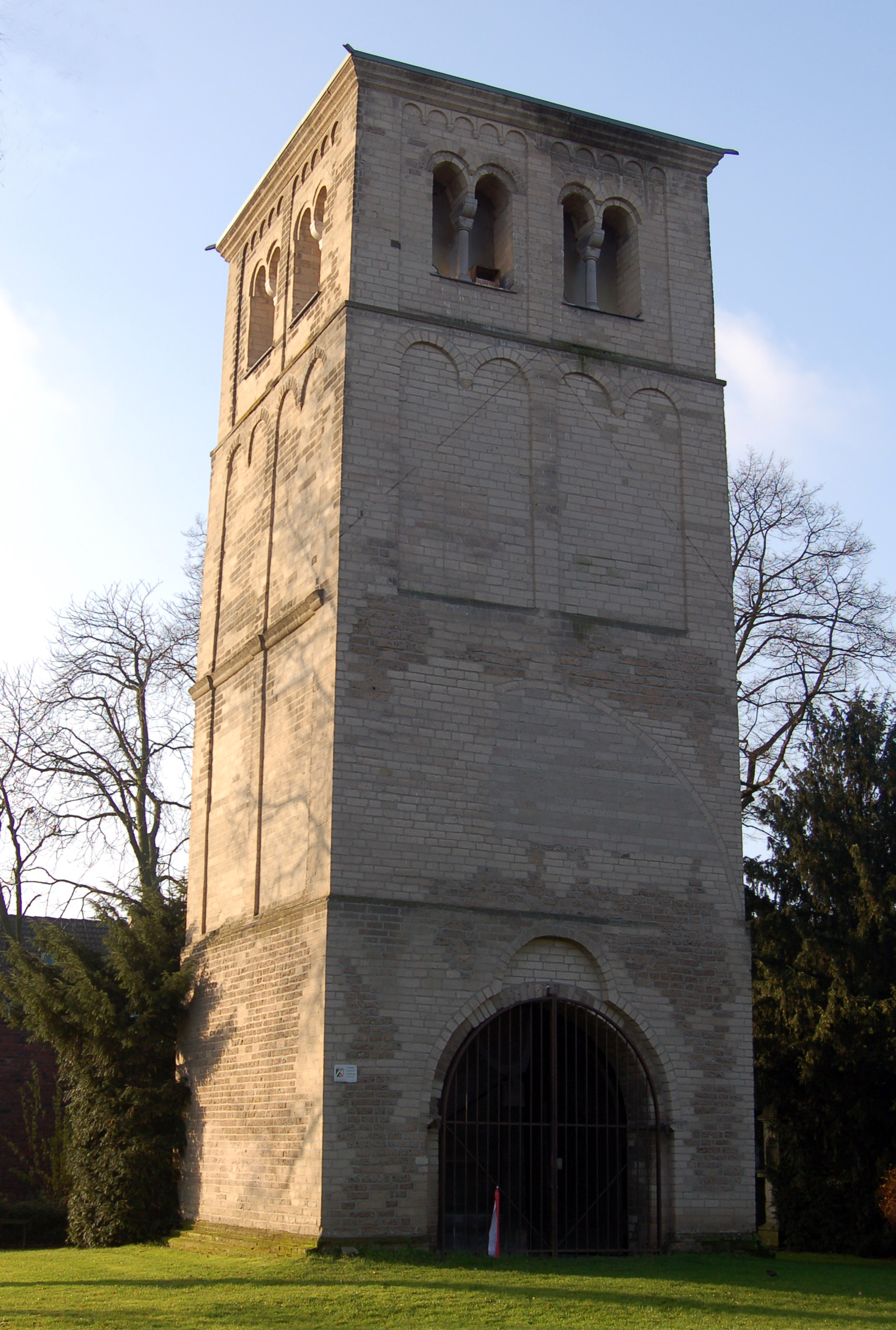 Alter Kirchturm in Meerbusch-Büderich, beherbergt ein Mahnmal von Joseph Beuys.